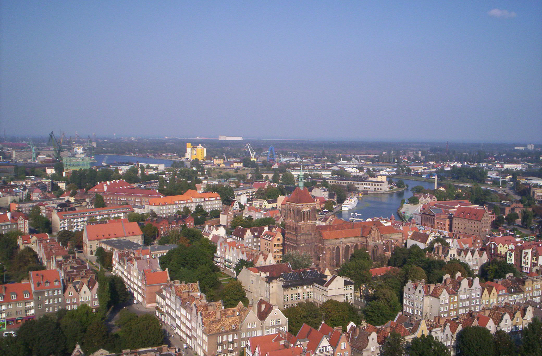 Gdańsk z lotu ptaka. Gdaňsk z ptačí perspektivy.